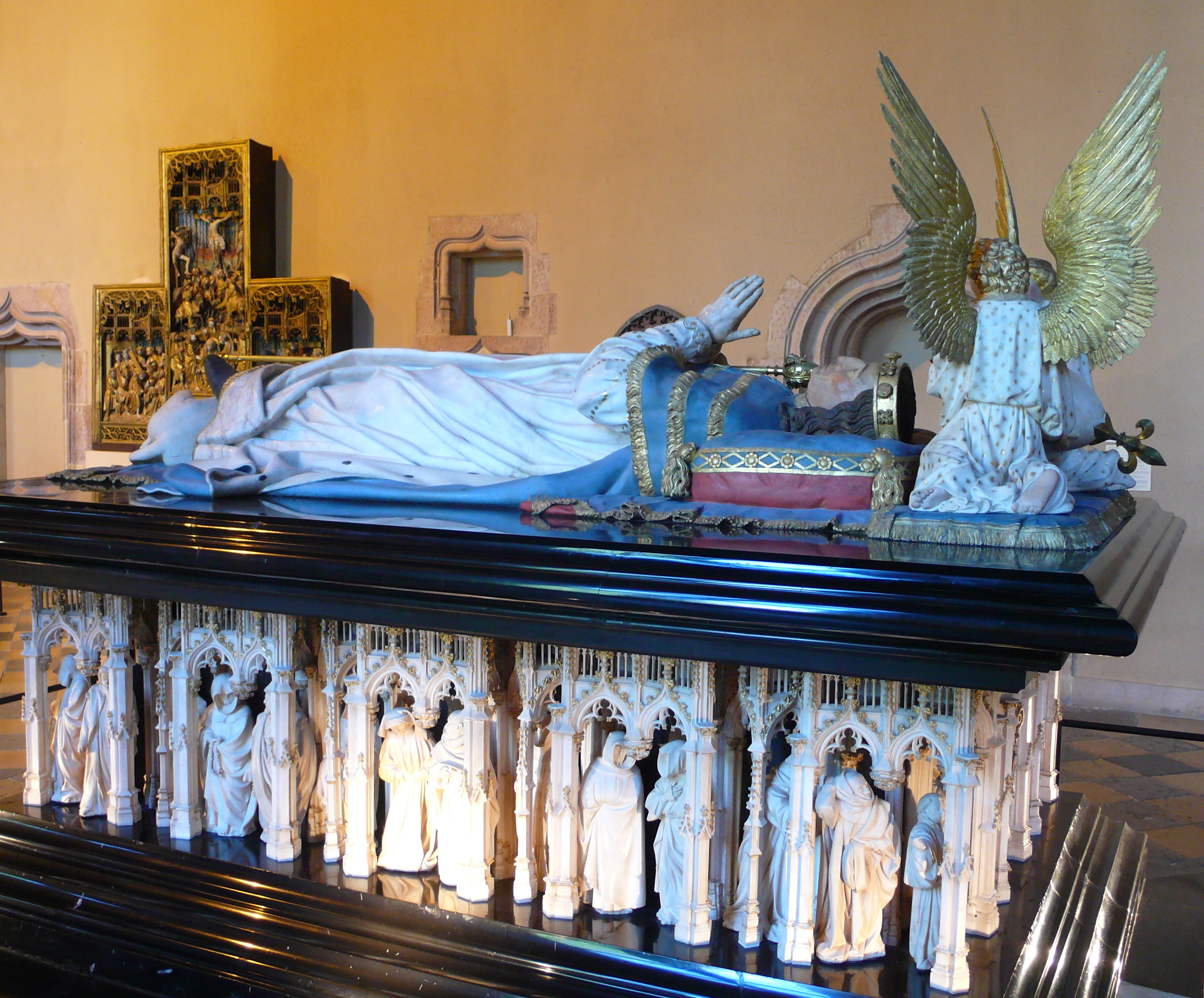 Tombeau du duc Philippe le Hardi au Palais des ducs de Bourgogne à Dijon